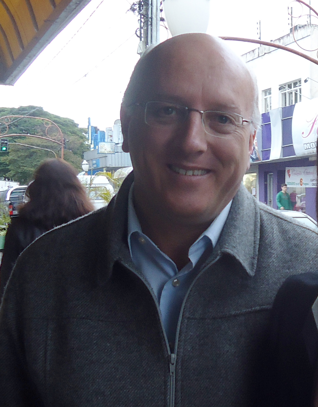 Roberto Ramalho Tavares, prefeito do município de Itapetininga período de 2004 a 2012. Em visita ao município de Avaré.